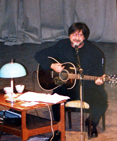 Юрий Шевчук. Сольный концерт в Барнауле